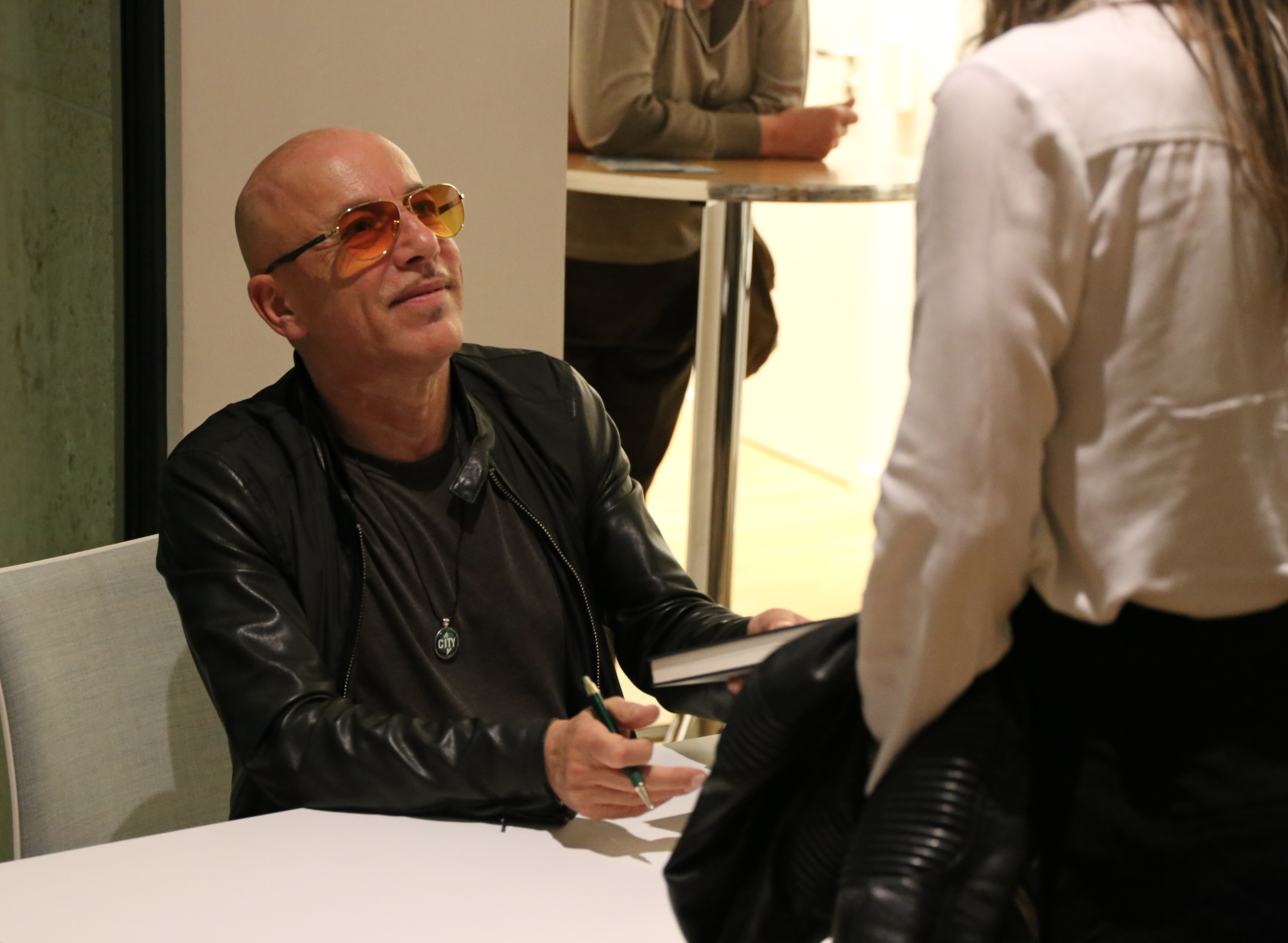 Toni Krahl. Musikalische Lesung "Rocklegenden" in der Stadtbibliothek Nordhausen am 10. April 2016.